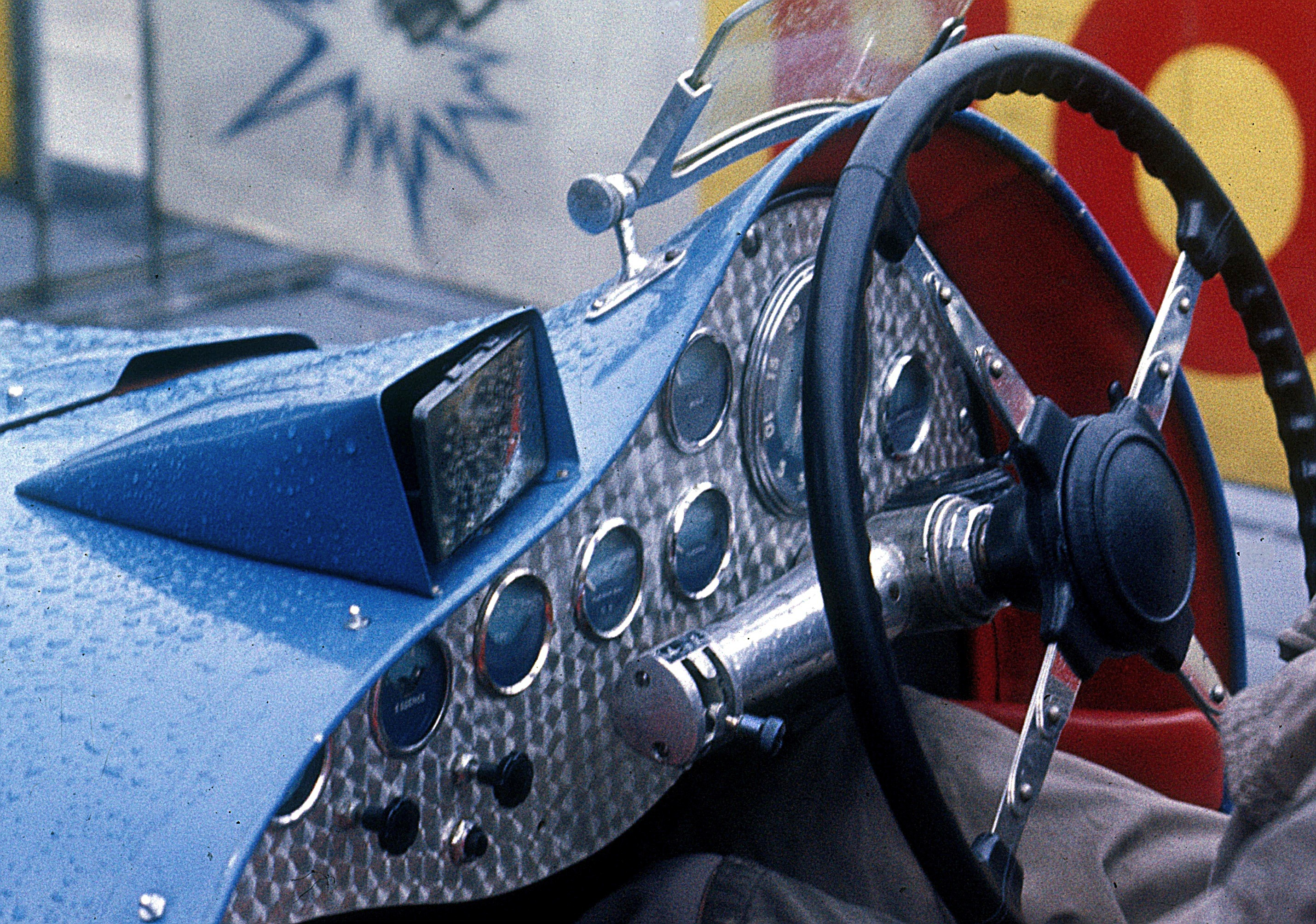 Delahaye 135 MS, Schalter des Vorwählgetriebes (Baujahr 1935)